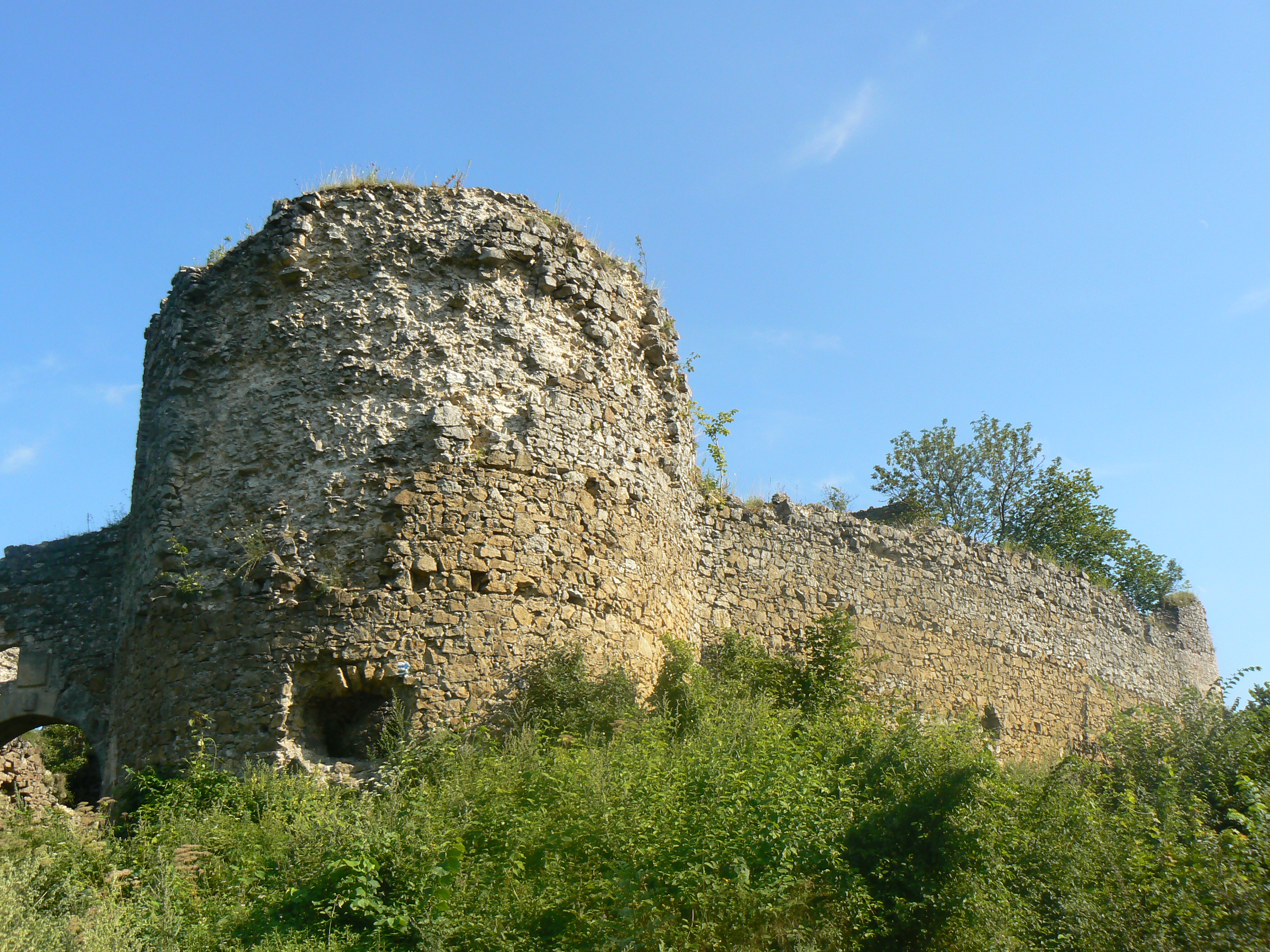 Jasenovský hrad - zrúcanina hradu.